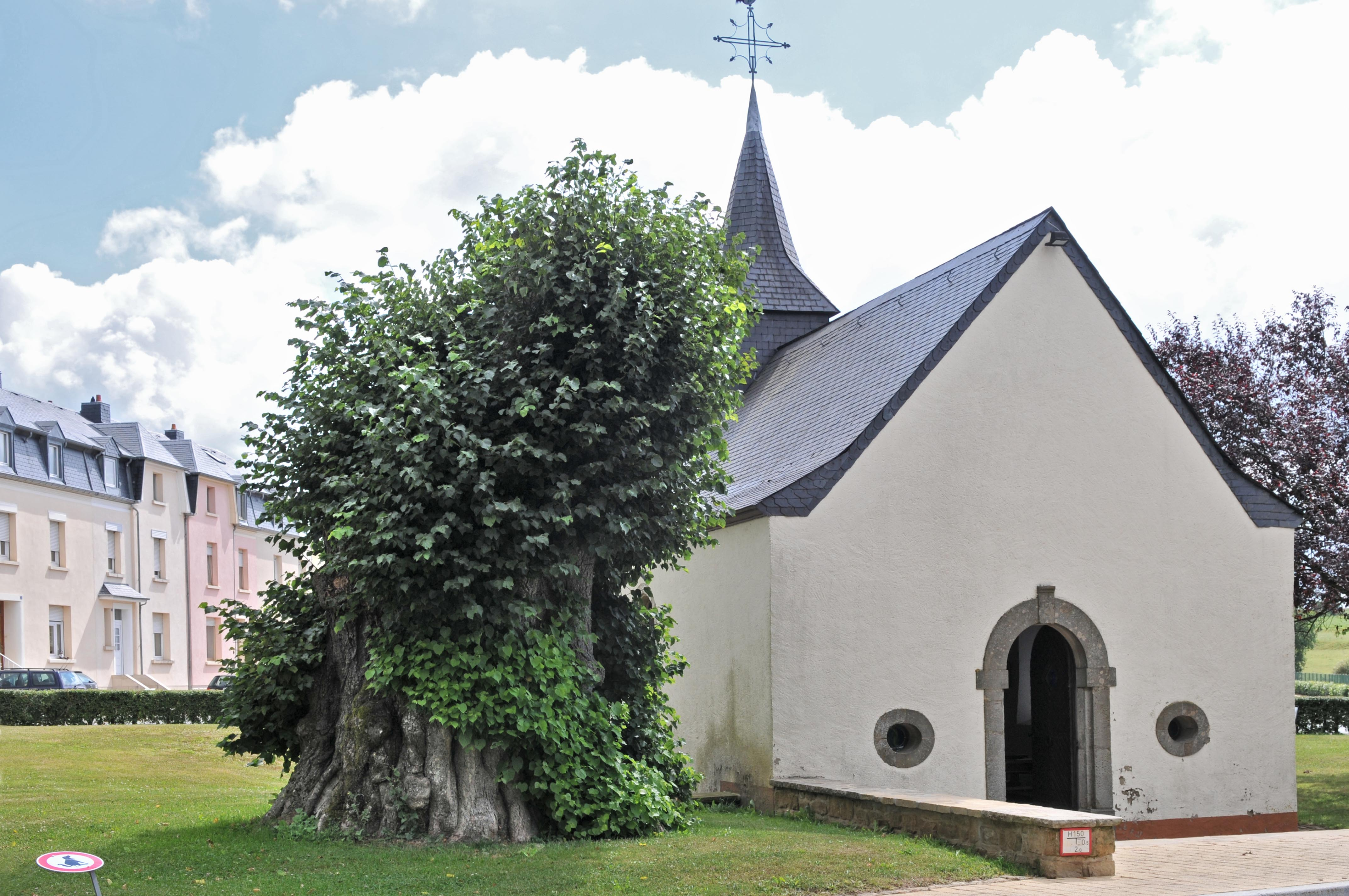 Wëll Lann zu Kënzeg 2008. Lann + Wëll Lann